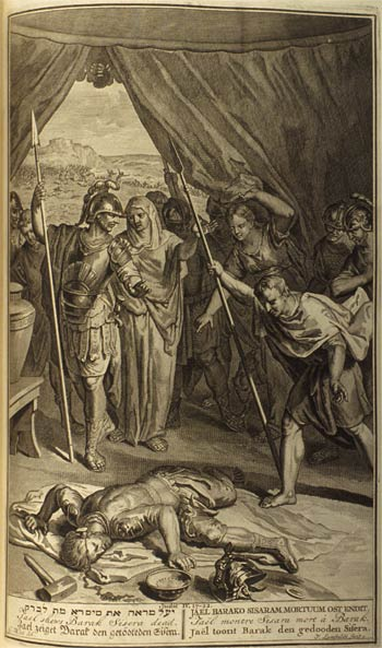 יעל מראה לברק את סיסרא המת (עפ"י רישיון Image(s) courtesy History of Science Collections, University of Oklahoma Libraries